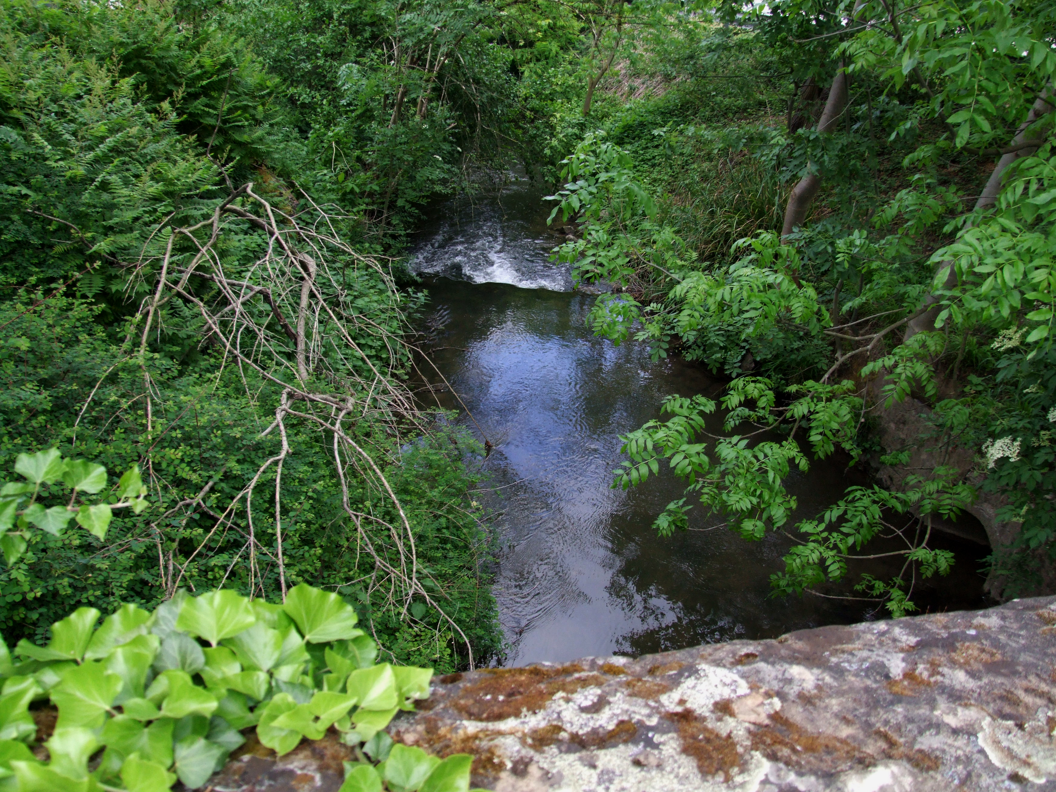 Angelbach bei Rauenberg-Rotenberg